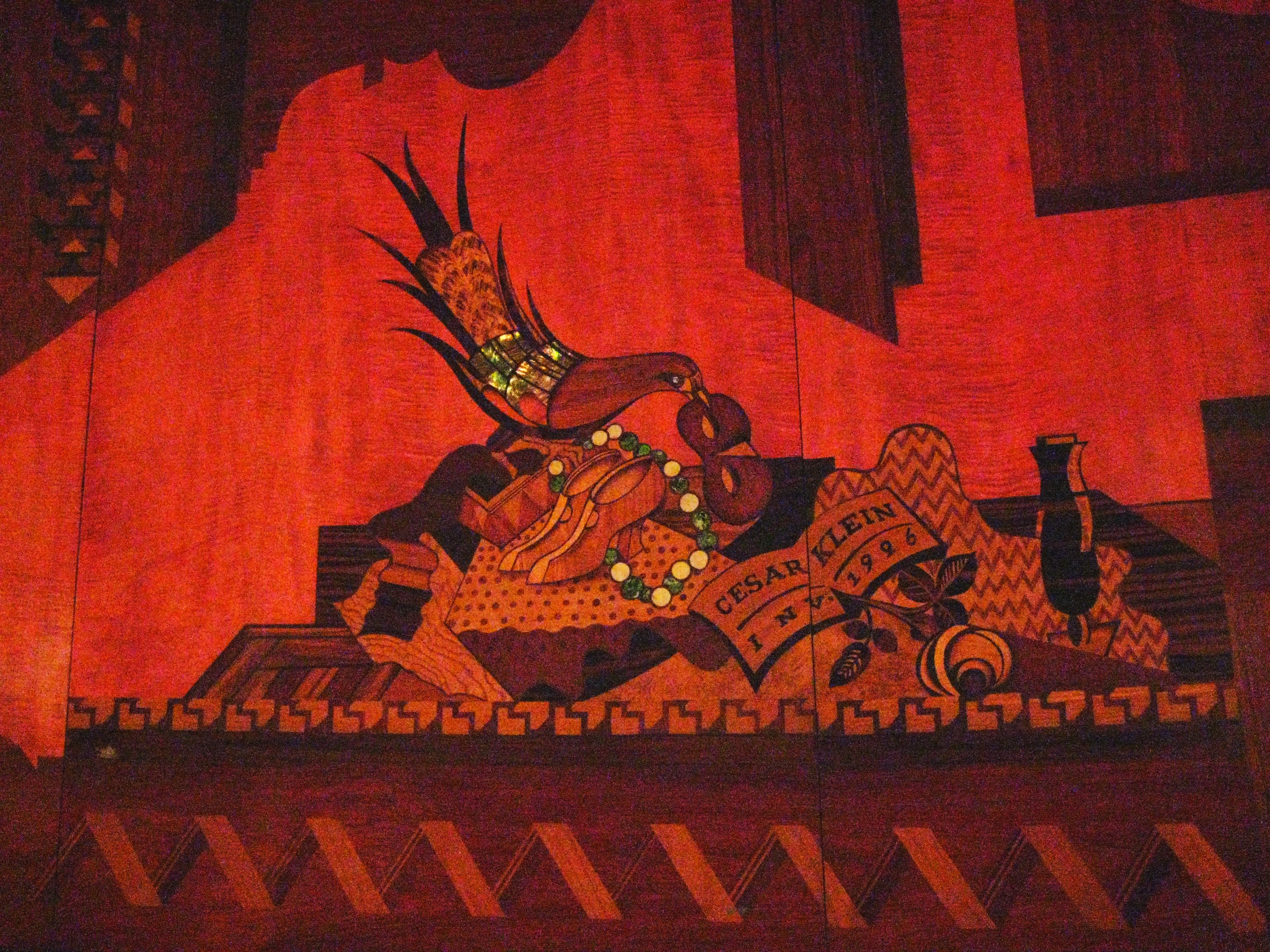 Intarsien von César Klein mit Signatur